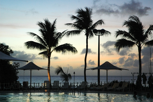 Sunset on Guam